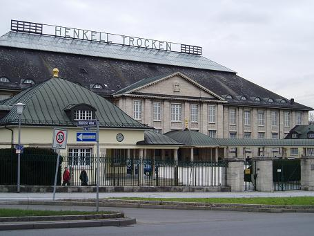 selbst fotografiert (01/2005)